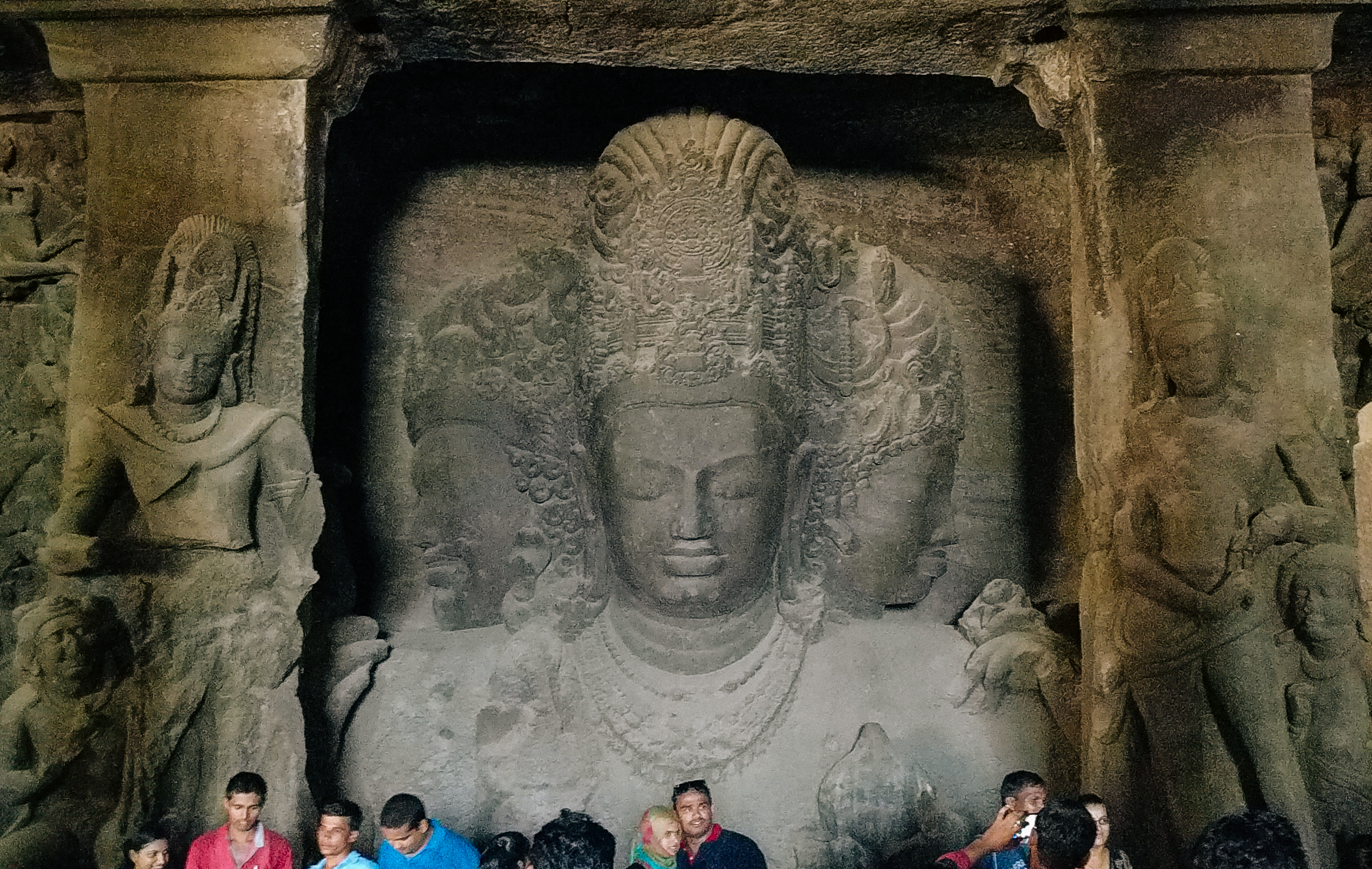 Elephanta Caves